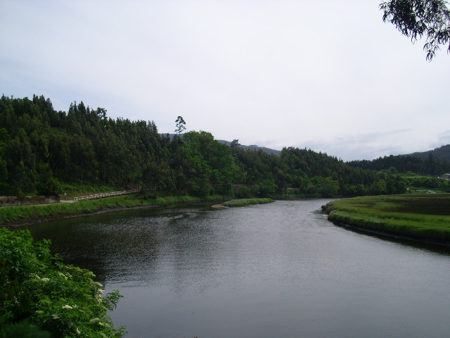 Paseo Río Landro, Viveiro (A Mariña Lucense)